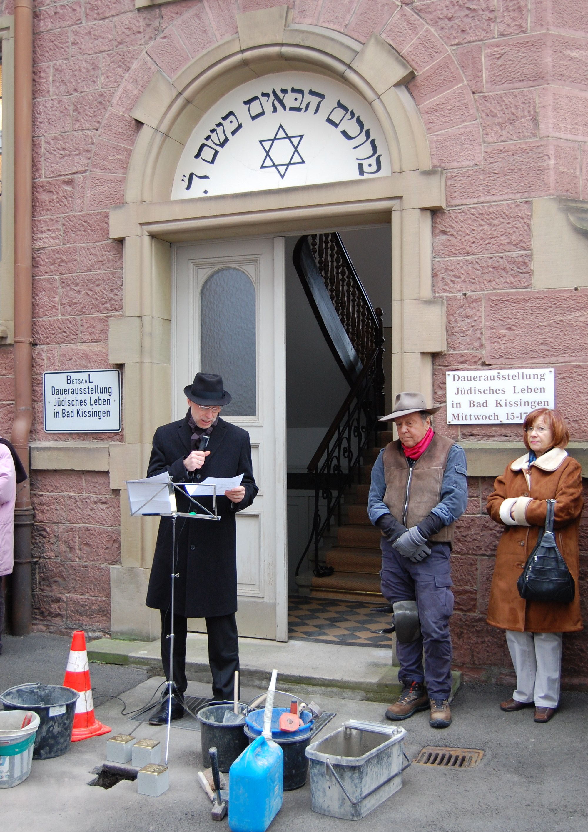 Bad Kissingens Oberbürgermeister Kay Blankenburg (links) und der Künstler Gunter Demnig (rechts) bei der Verlegung der drei Stolpersteine für Gustav Neustädter und Familie vor dem Jüdischen Gemeindehaus in Bad Kissingen